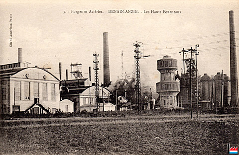 Escaudain - Hauts Fourneaux et des Forges et Aciéries de Denain-Anzin